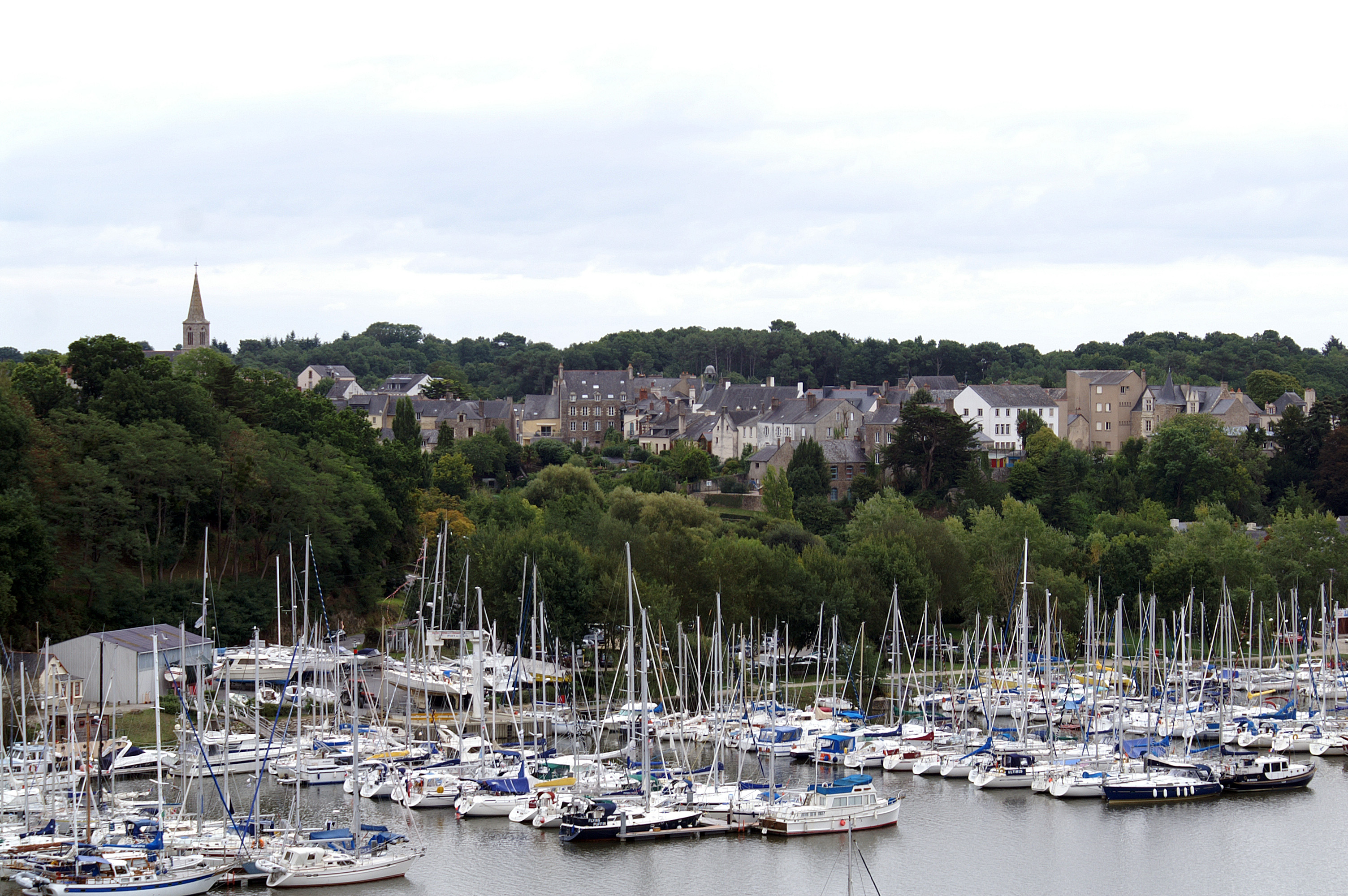 la ville de La Roche-Bernard et son port de plaisance sur La Vilaine.